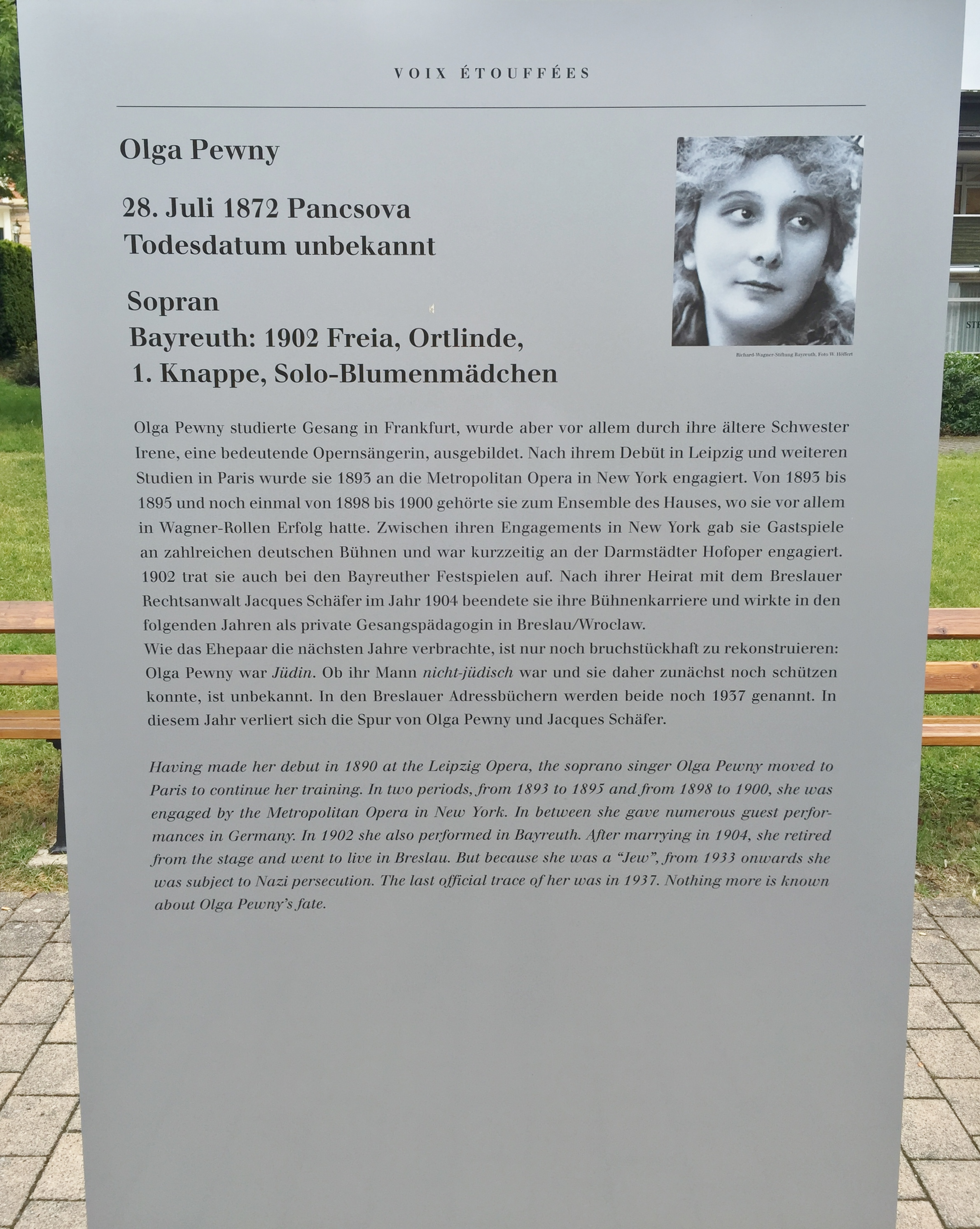 "Verstummte Stimmen - Die Bayreuther Festspiele und die 'Juden' 1876 bis 1945", Ausstellung 2016